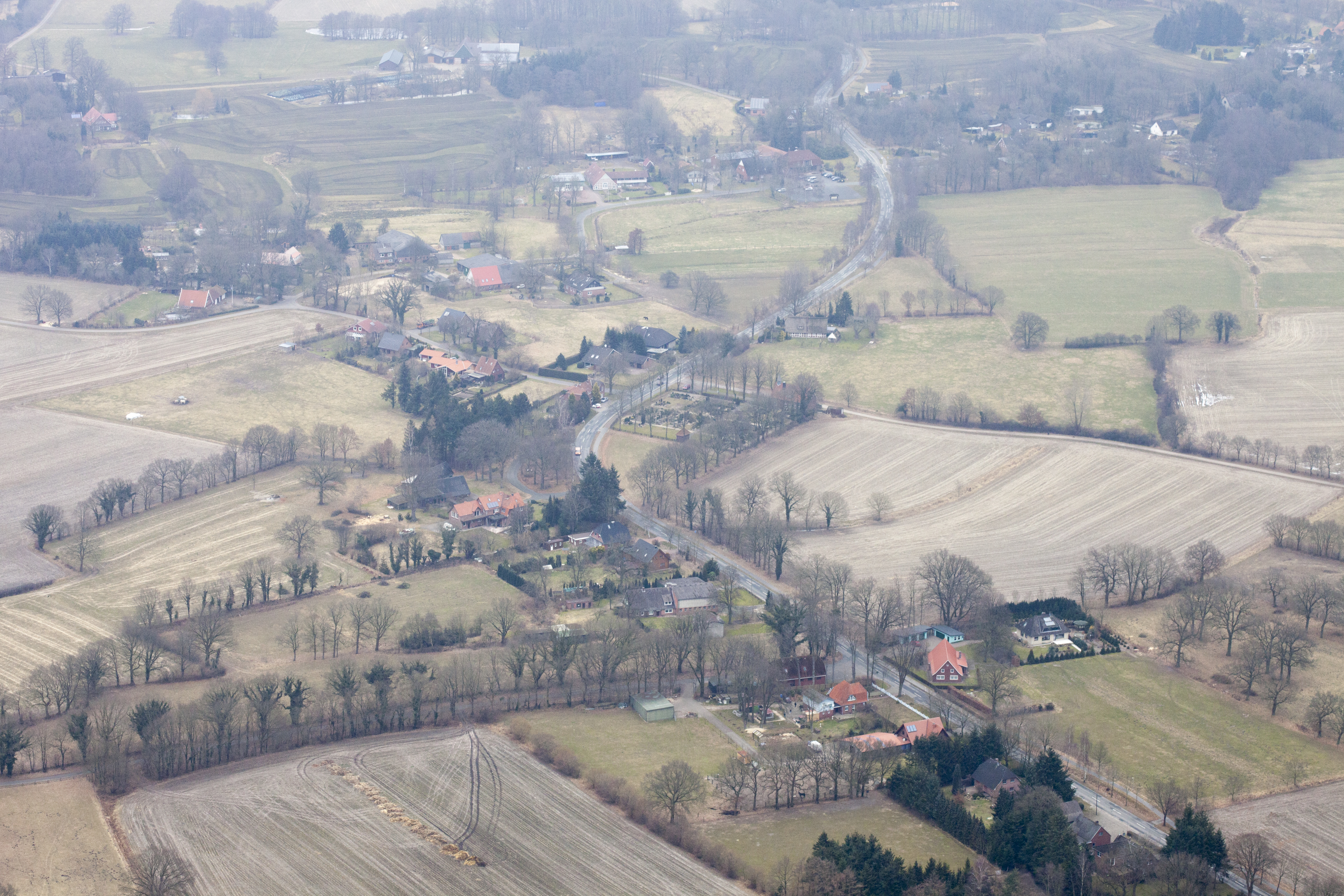 Luftaufnahme: der Ortsteil Westerhamm von Wingst